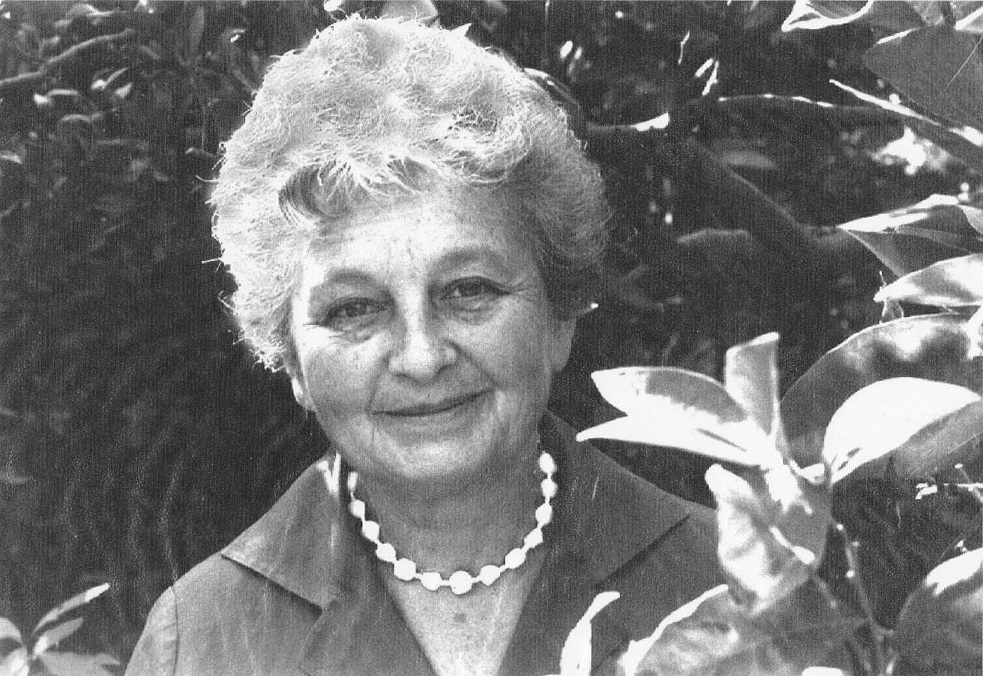 רבקה גוילי בגינת ביתה שברמת השרון